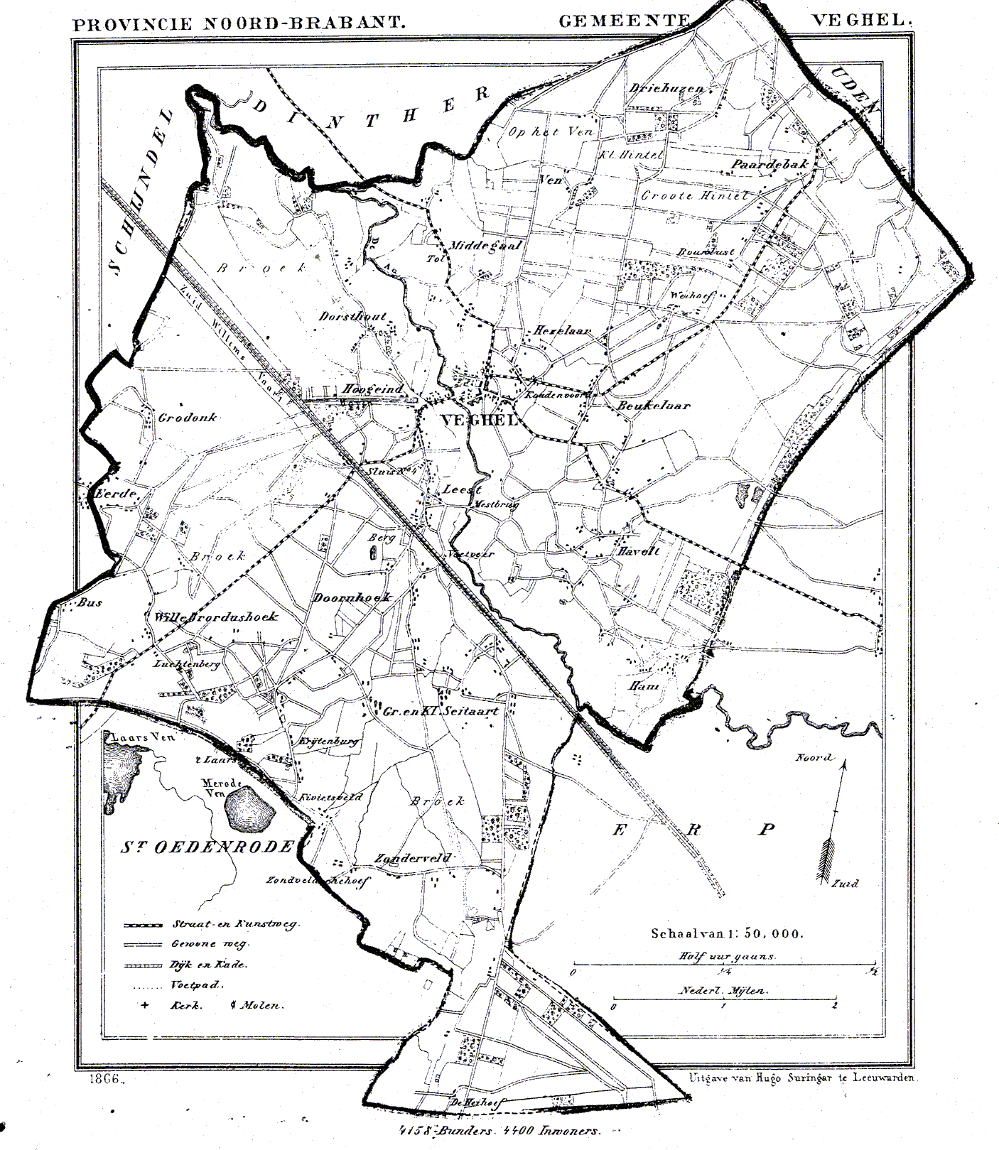 Nederland, Noord-Brabant, Gemeente Veghel